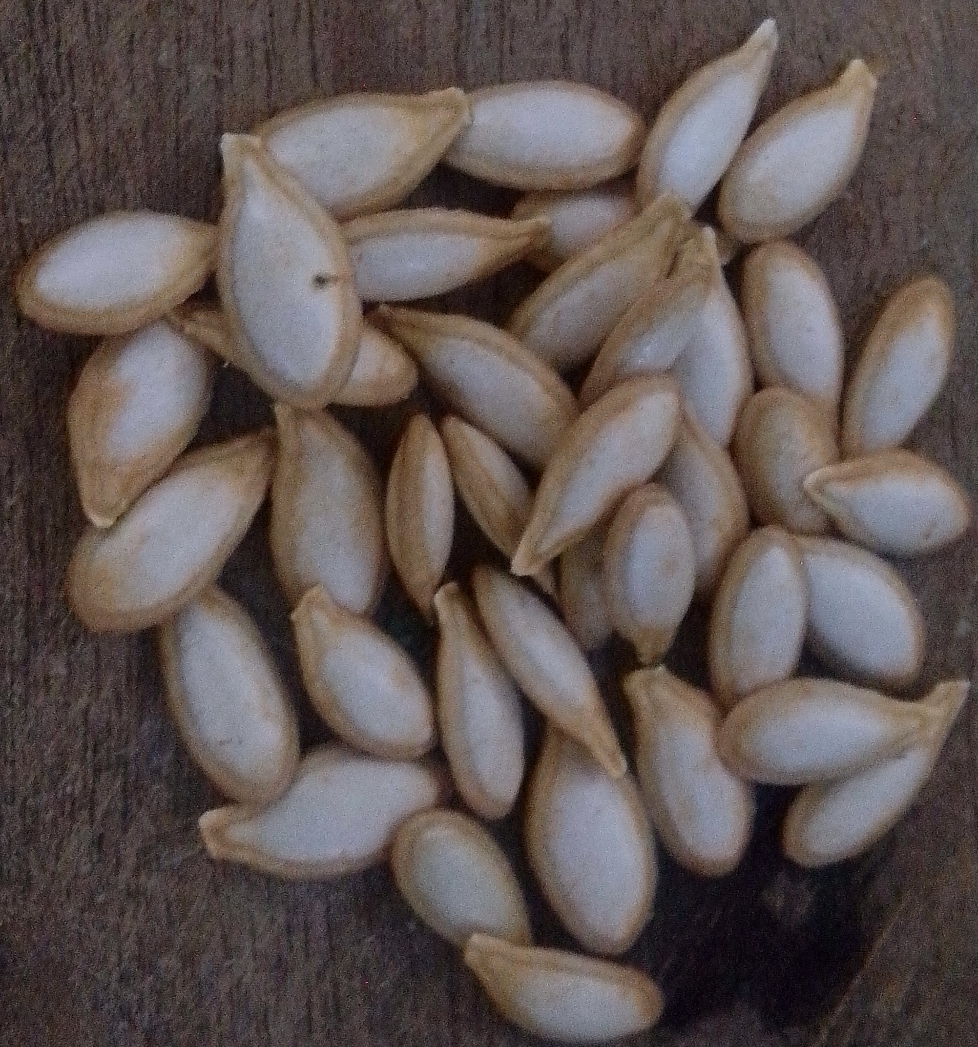 பூசணியின் விதைகள், சின்ன சேலம், தமிழகம், இந்திய ஒன்றியம்.